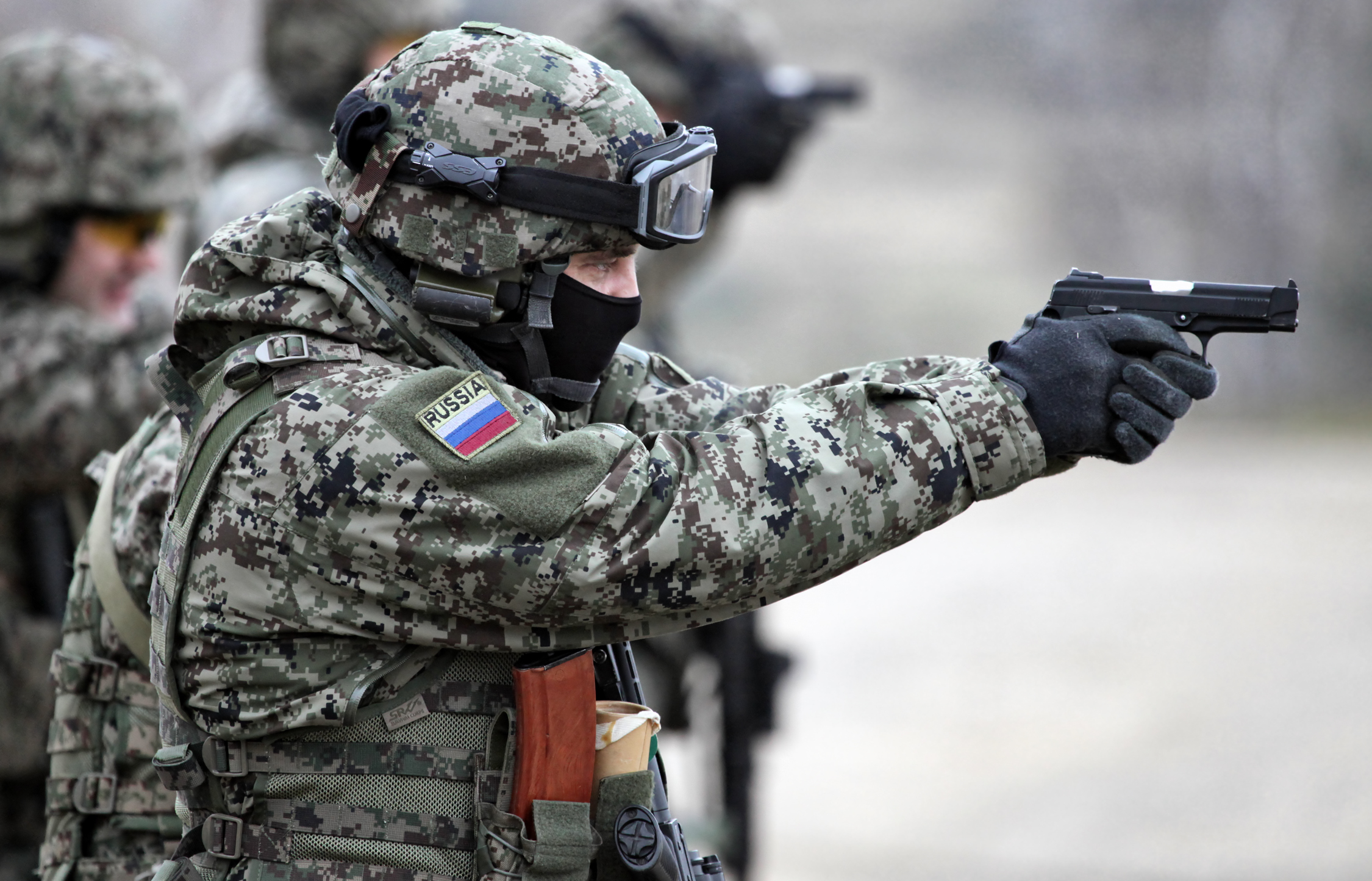 ОСН Гром ФСКН России (Grom Special purpose unit of Federal Drug Control Service)